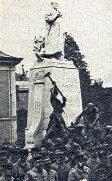 Le monument Léon Bollée avenue de la gare (maintenant avenue du Général Leclerc) Le mans 1920 - Le Miroir des Sports, 4 novembre 1920, p.283